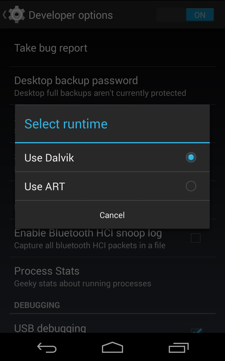 فعالسازی Art در اندروید 4.4